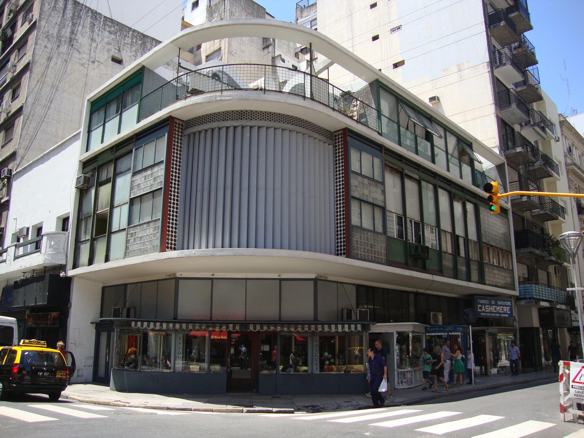 Edificio proyectado por los arquitectos Bonet Castellana, Vera Barros y López Chas en 1938. Esquina de Suipacha y Paraguay, barrio de Retiro. Buenos Aires, Argentina.